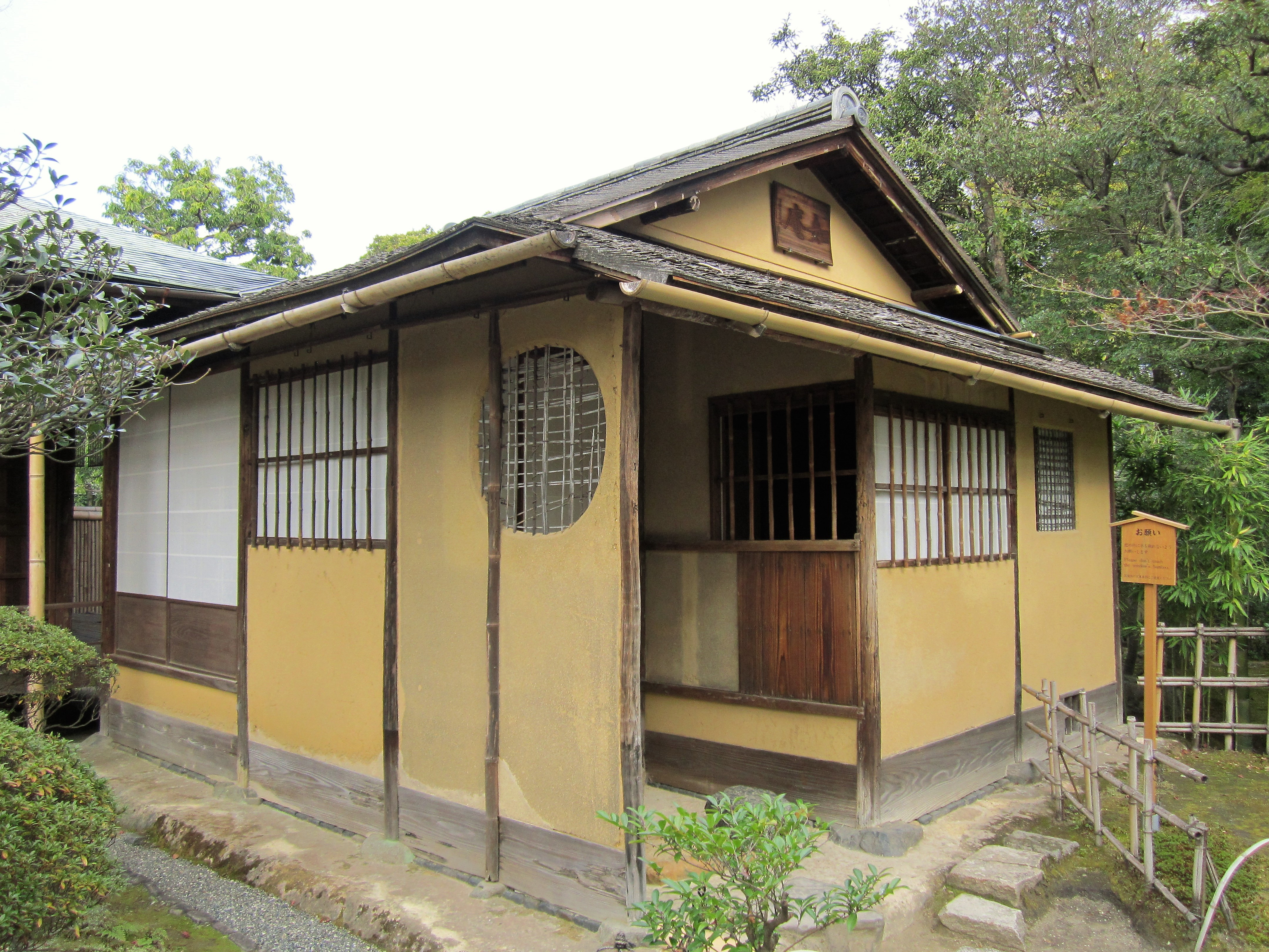 有楽苑の如庵 Canon PowerShot A2200